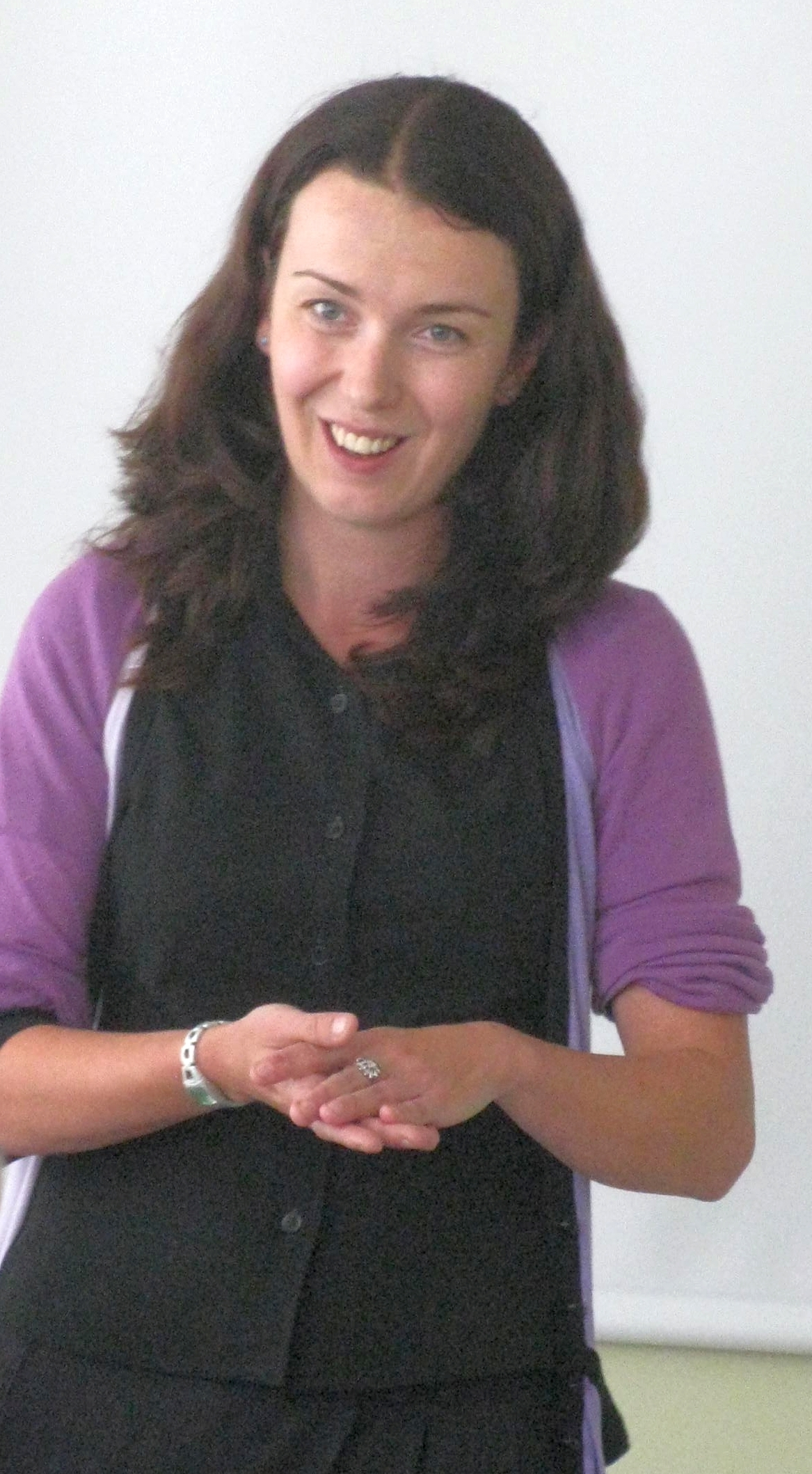 Riin Sirkel esinemas Eesti filosoofia 7. aastakonverentsil Tartus